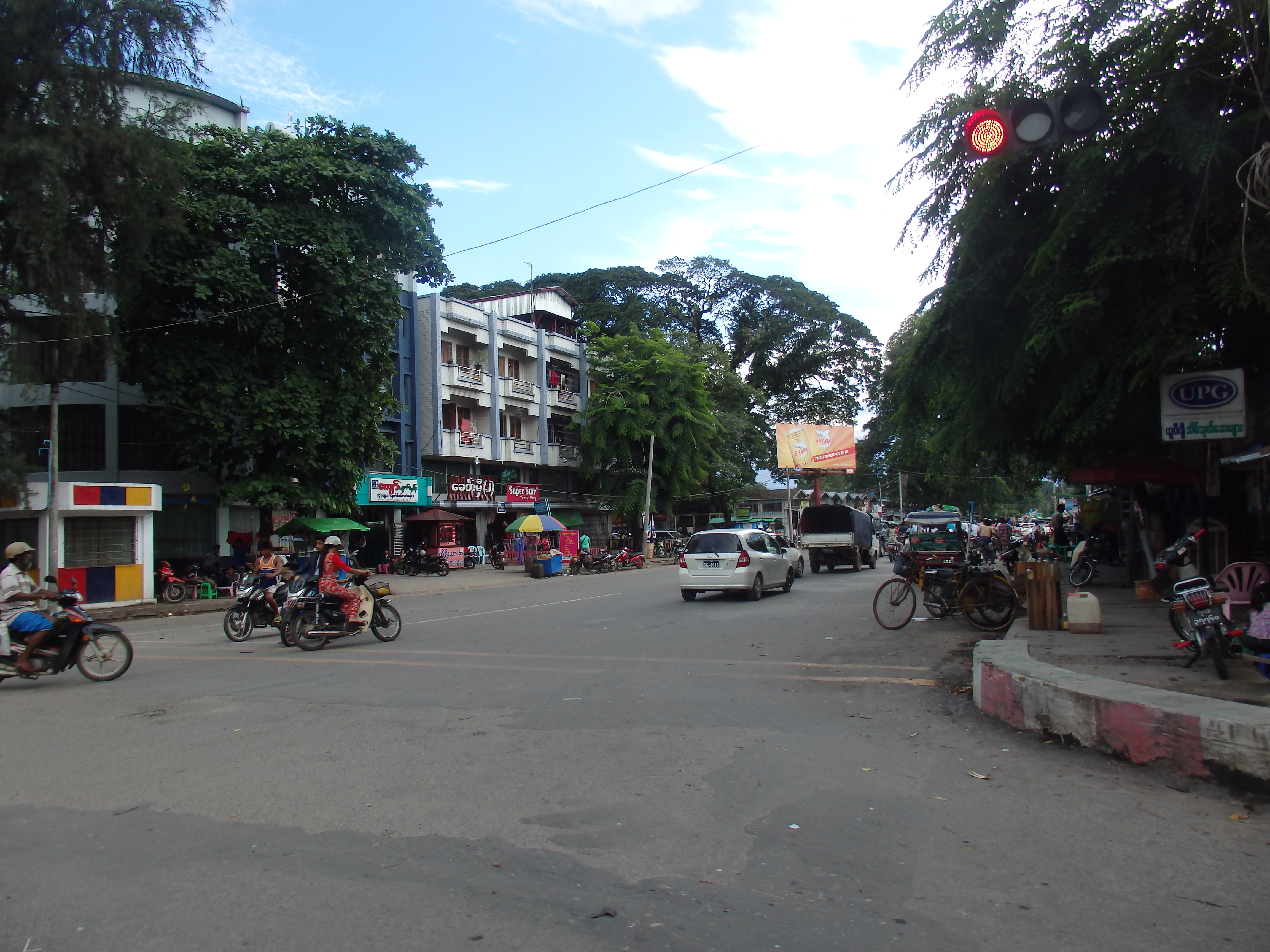 Myitkyina, Myanmar (Burma)